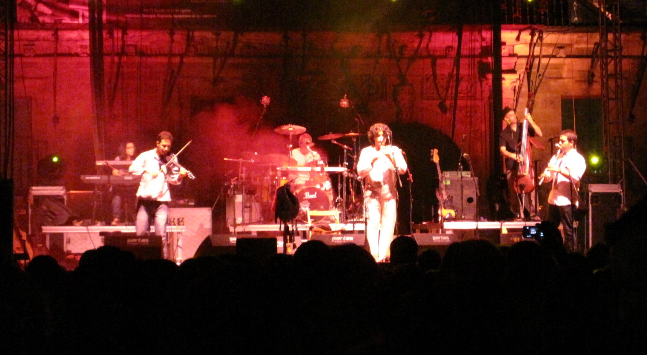 El grupo de música celta Gandalf durante un concierto celebrando su X aniversario en Astorga (León, España).